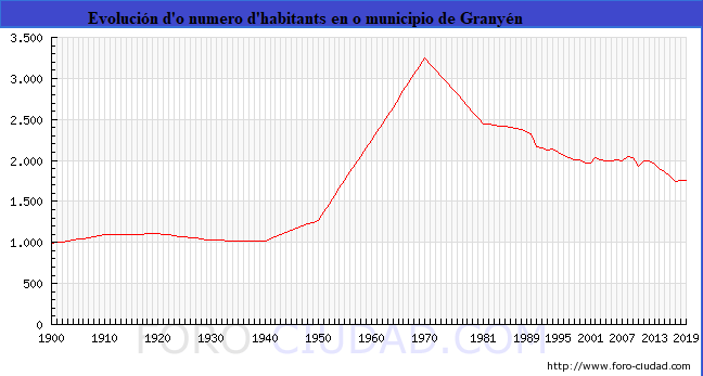 Aragonés: Evolución d'o numero d'habitants de Granyén.